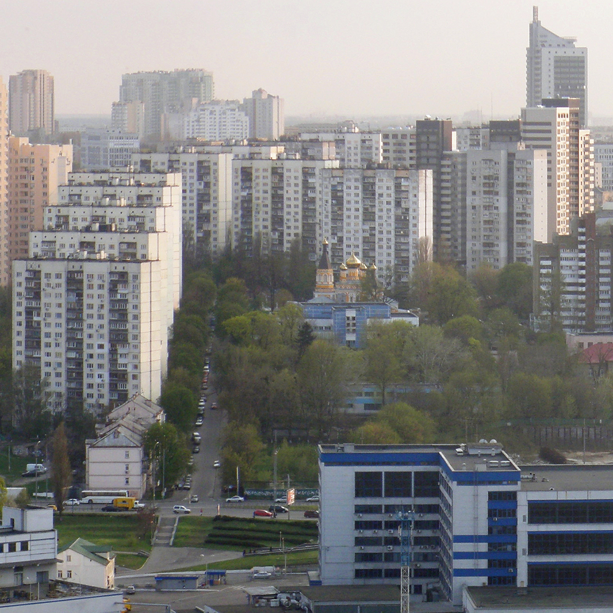 улица Николая Островского в Киеве